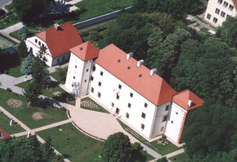 Hrad Vaja Vár v Maďarsku